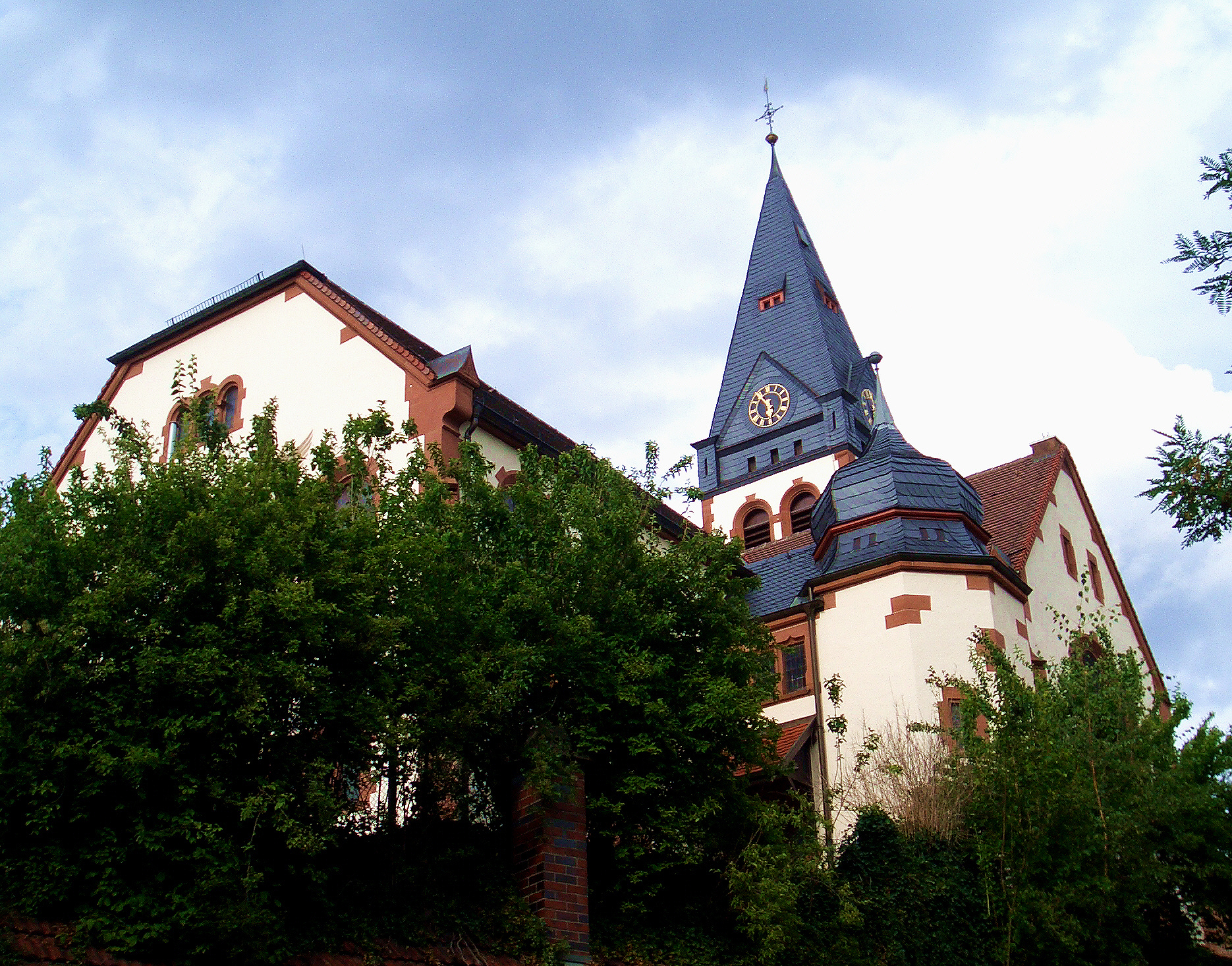 Heidelberg-Rohrbach, Melanchthonkirche